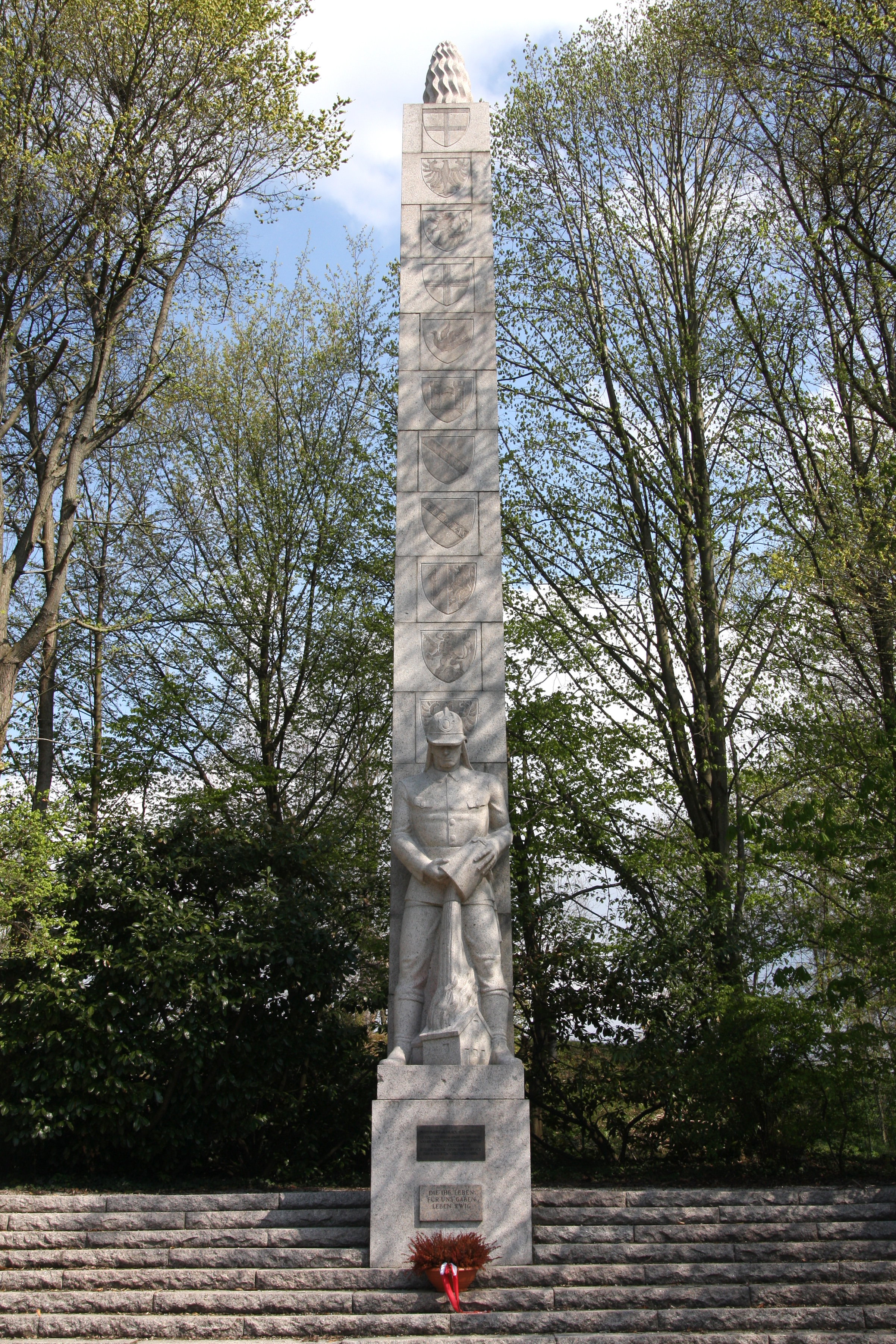 Landes-Feuerwehr-Ehrenmal Baden-Württemberg in Achern (Deutschland, Ortenaukreis), 1936 erbaut. Das Denkmal steht zu Ehren der Feuerwehrleute Baden-Württembergs, die ihr Leben im Dienst für den Nächsten verloren haben. Es wurde vom Karlsruher Bildhauer Karl Dietrich nach einem Entwurf des Architekten Franz Kuhn aus Heidelberg gefertigt.